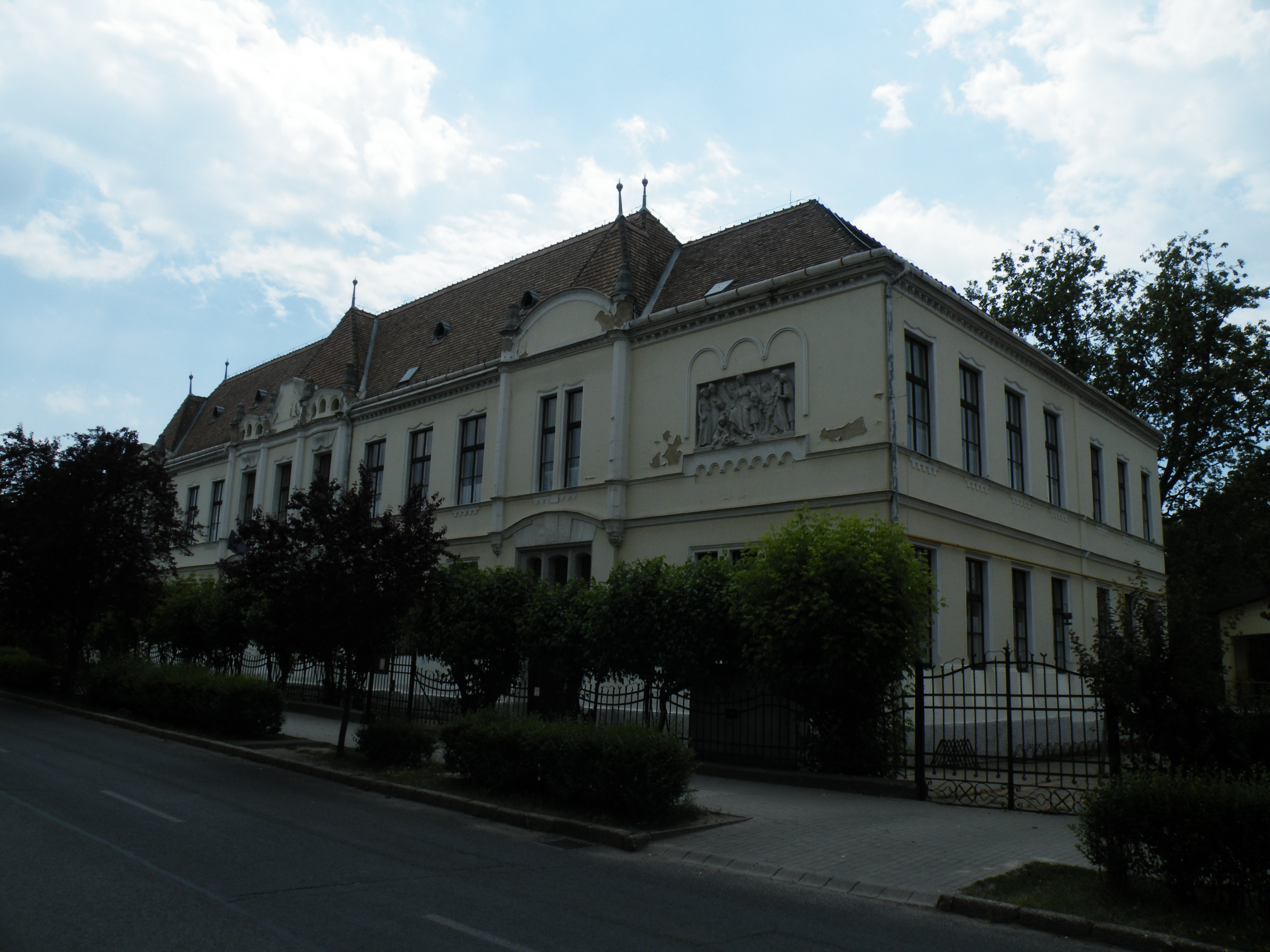 A balassagyarmati Kiss Árpád Általános Iskola épülete